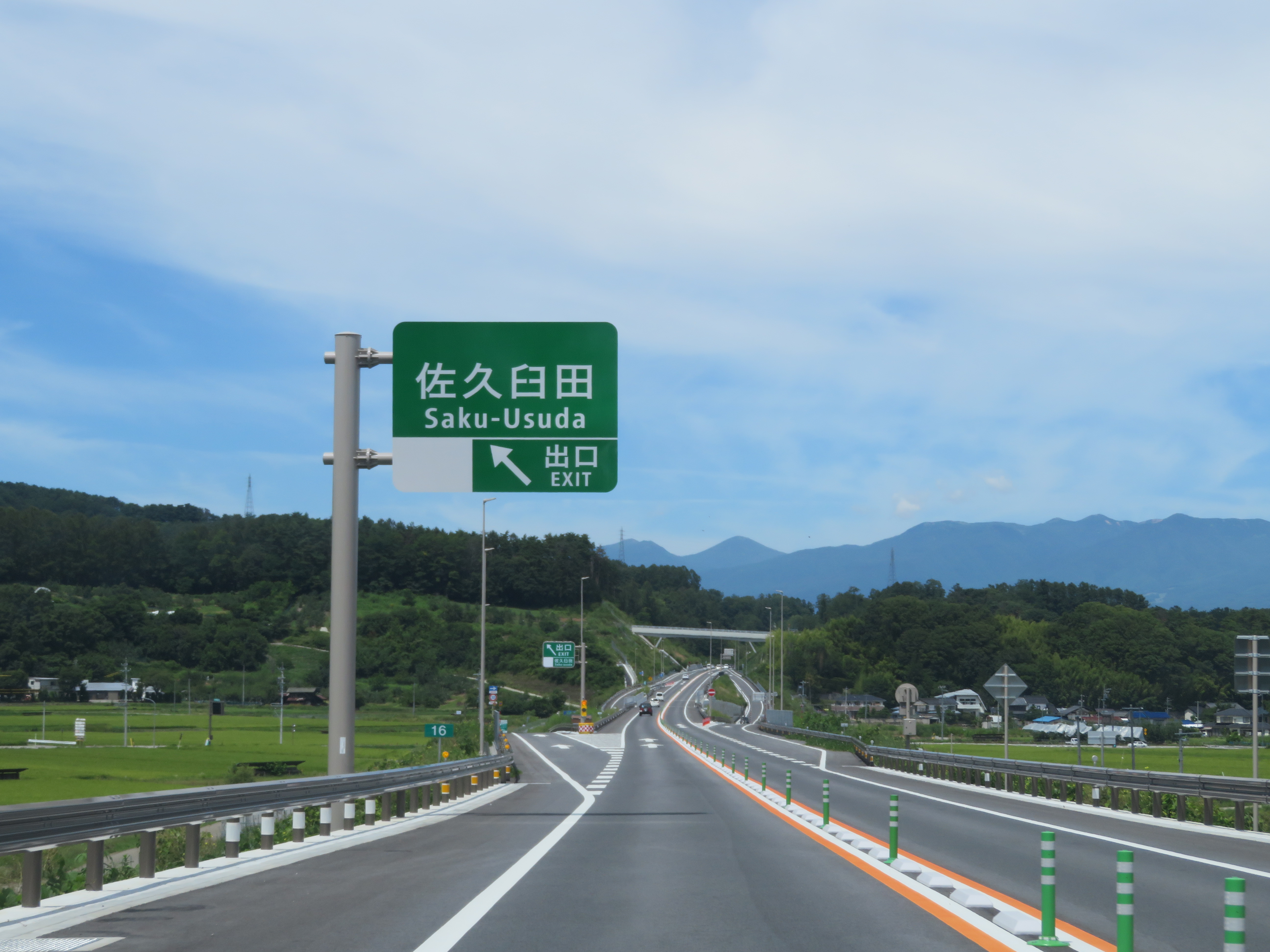 中部横断自動車道佐久臼田インターチェンジ出口付近（八千穂高原方面側から撮影） Canon PowerShot SX720 HS